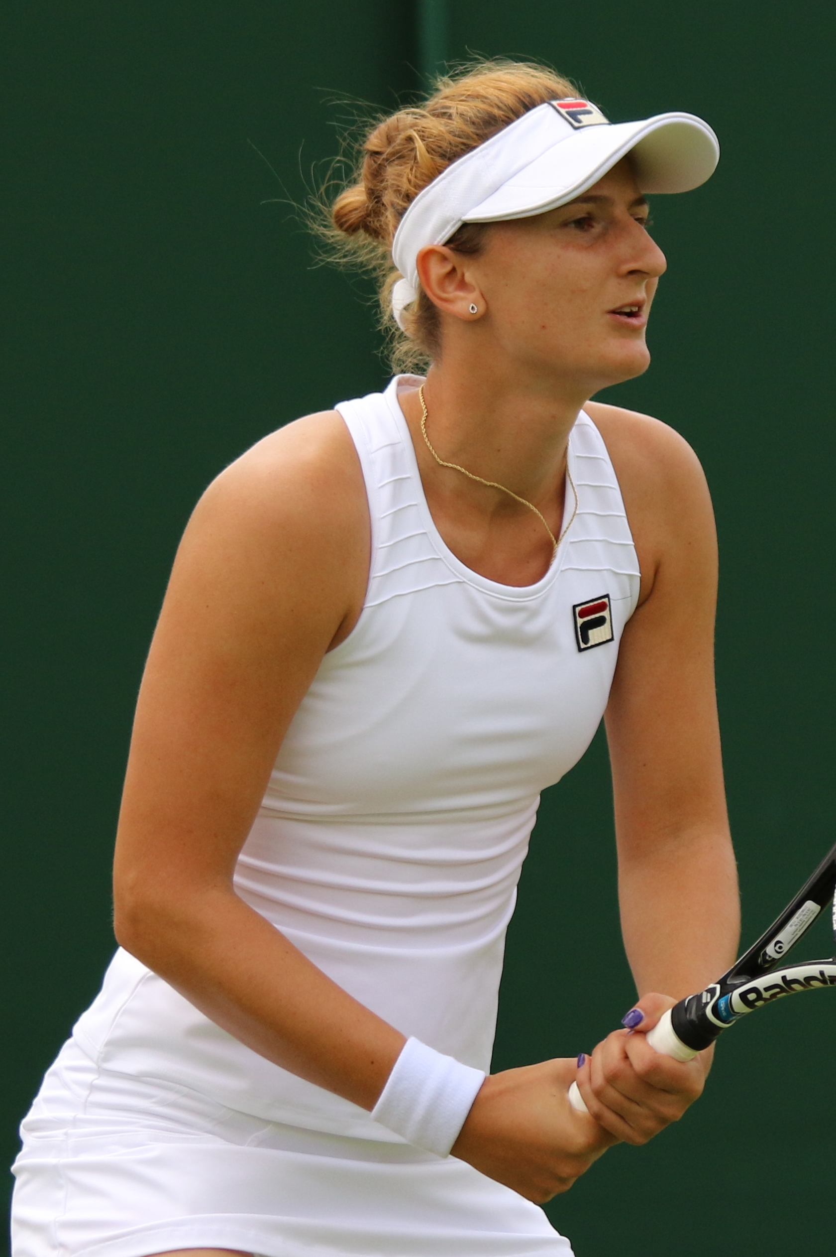 Begu WM16 (6)